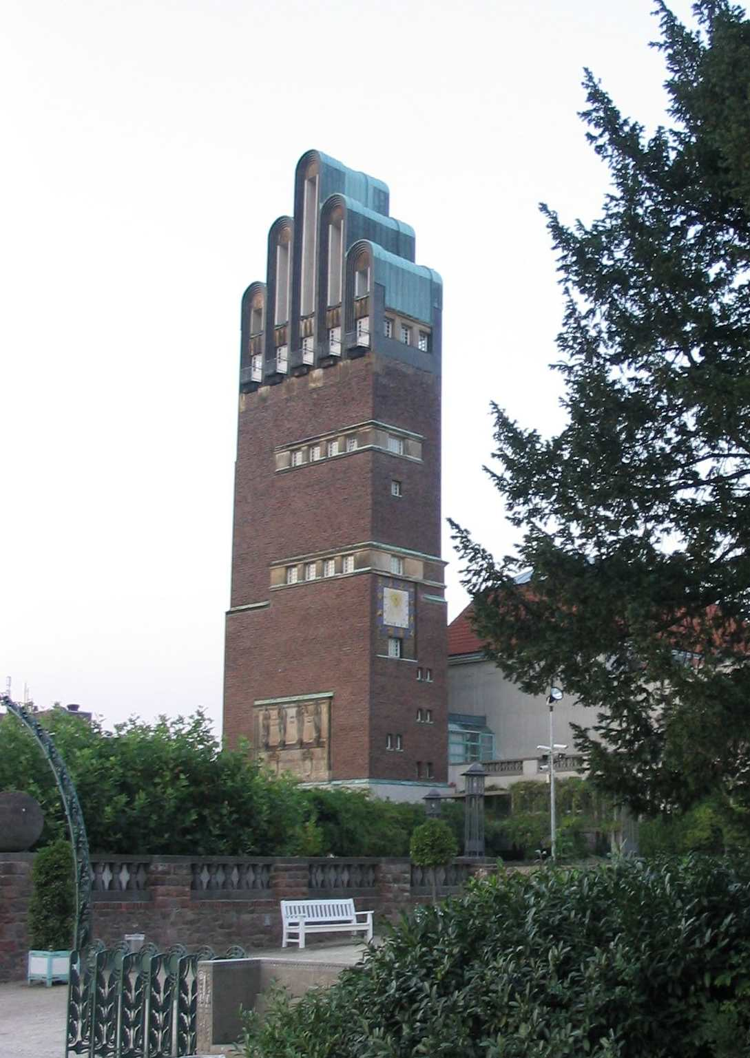 Hochzeitsturm auf der Mathildenhöhe in Darmstadt